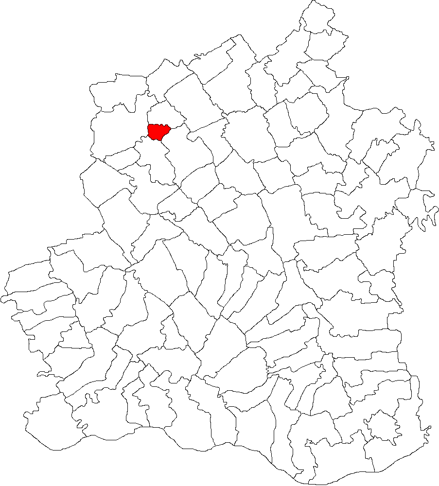 Categorie:Hărţi ale judeţului Teleorman